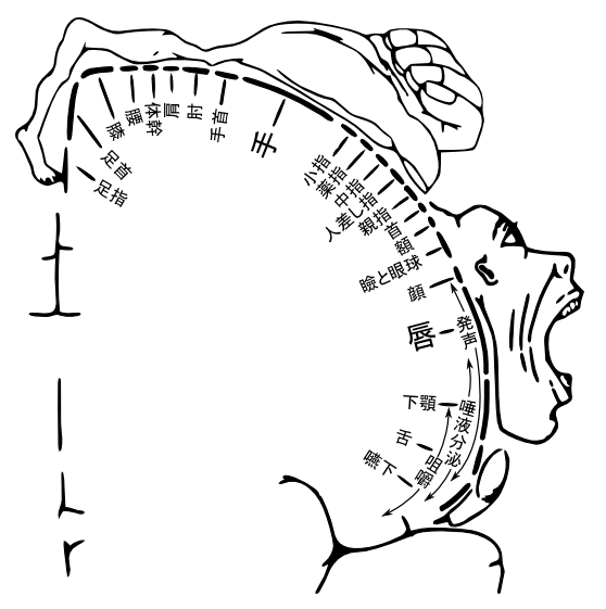 motor homunculus in Japanese language. 運動皮質における身体の対応部位を示した図。ペンフィールドのホムンクルス。